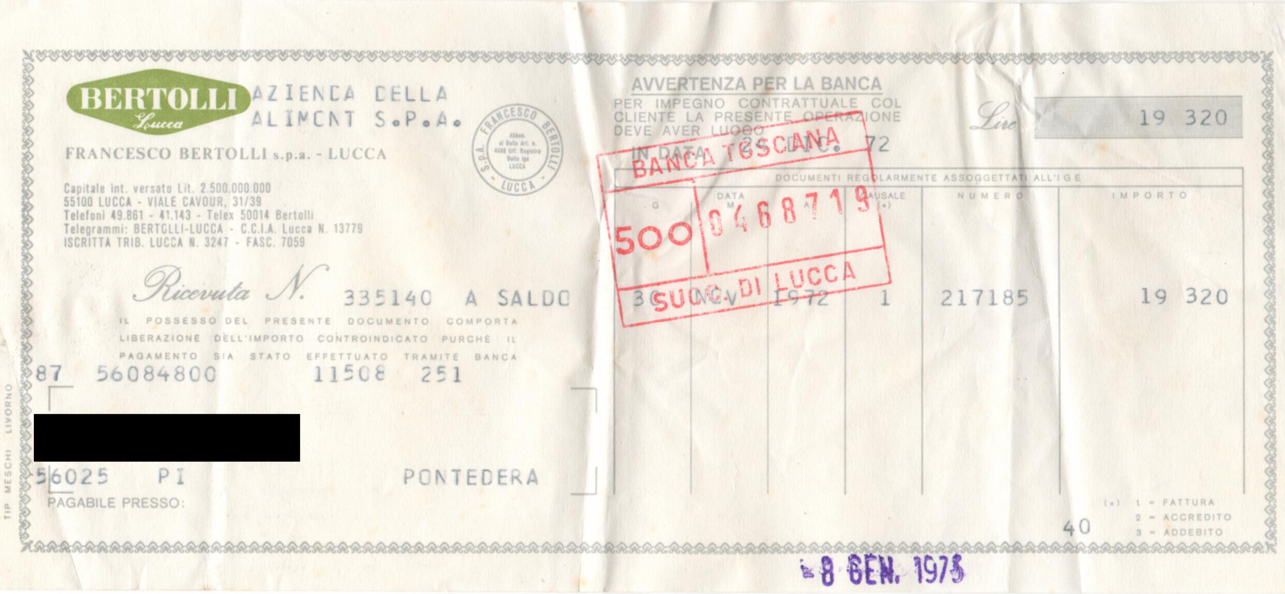 Ricevuta di pagamento dalla Bertolli per l'acquisto di prodotti alimentari del gennaio 1975 dove si può leggere accanto al logo l'affiliazione alla Alimont S.p.A.. Il negozio di consegna si trovava a Pontedera (PI).